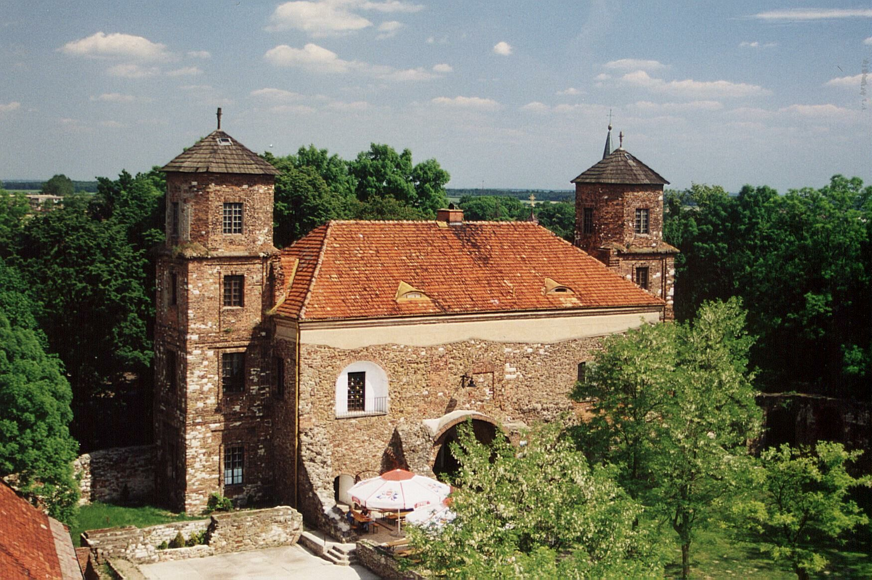 Zamek w Toszku